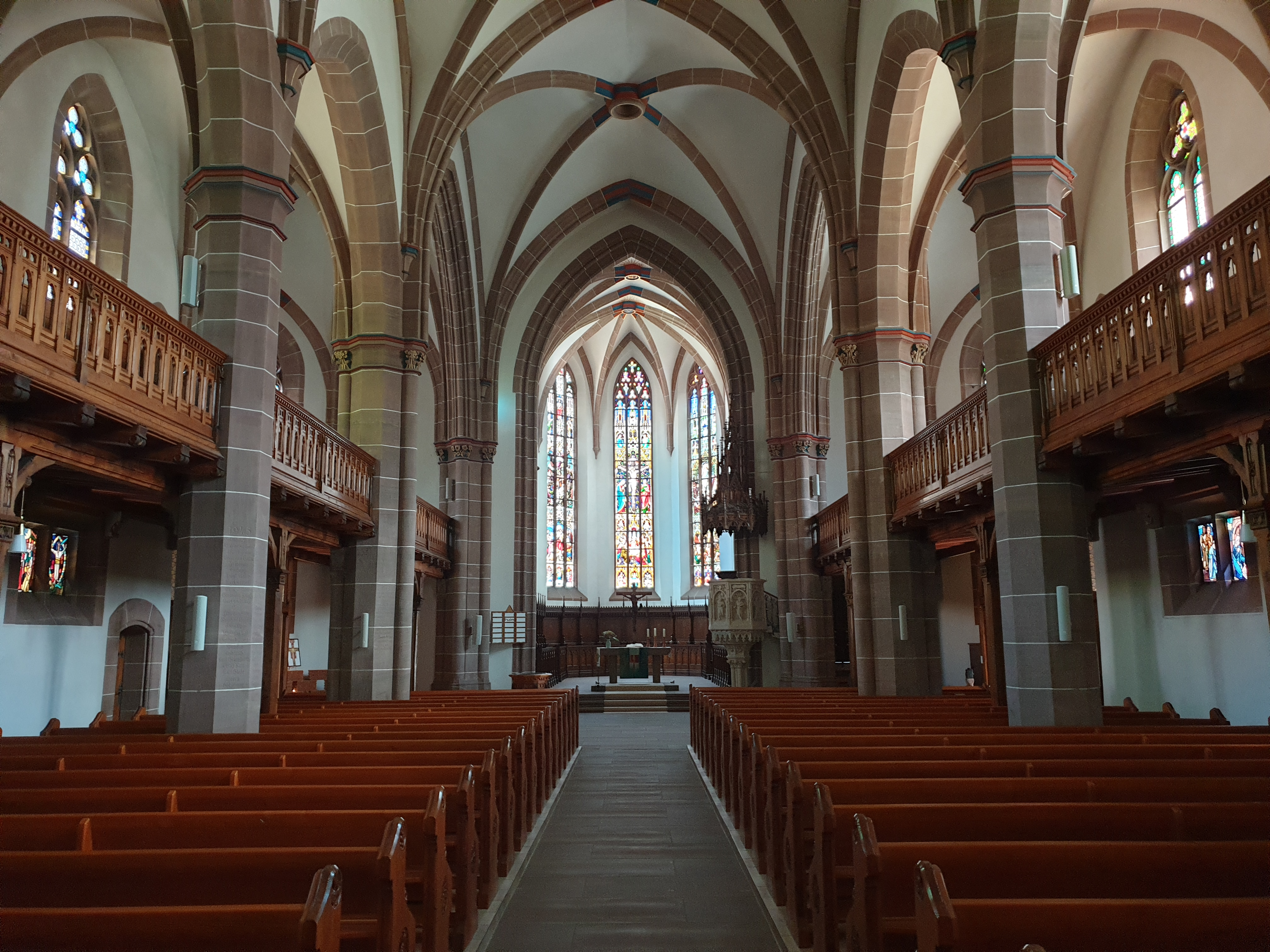 Innenraum: Blick Richtung Chorraum